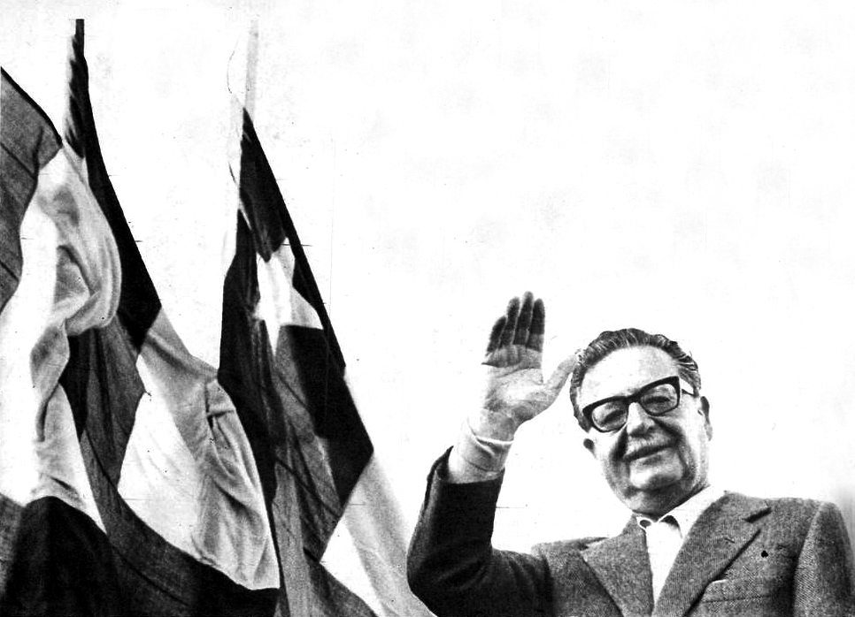 Inserto de campaña en revista Vea, de las elecciones parlamentarias de 1973, en la fotografía aparece Salvador Allende.